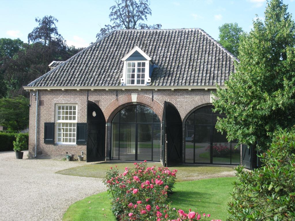 Koetshuis behorend bij het landgoed